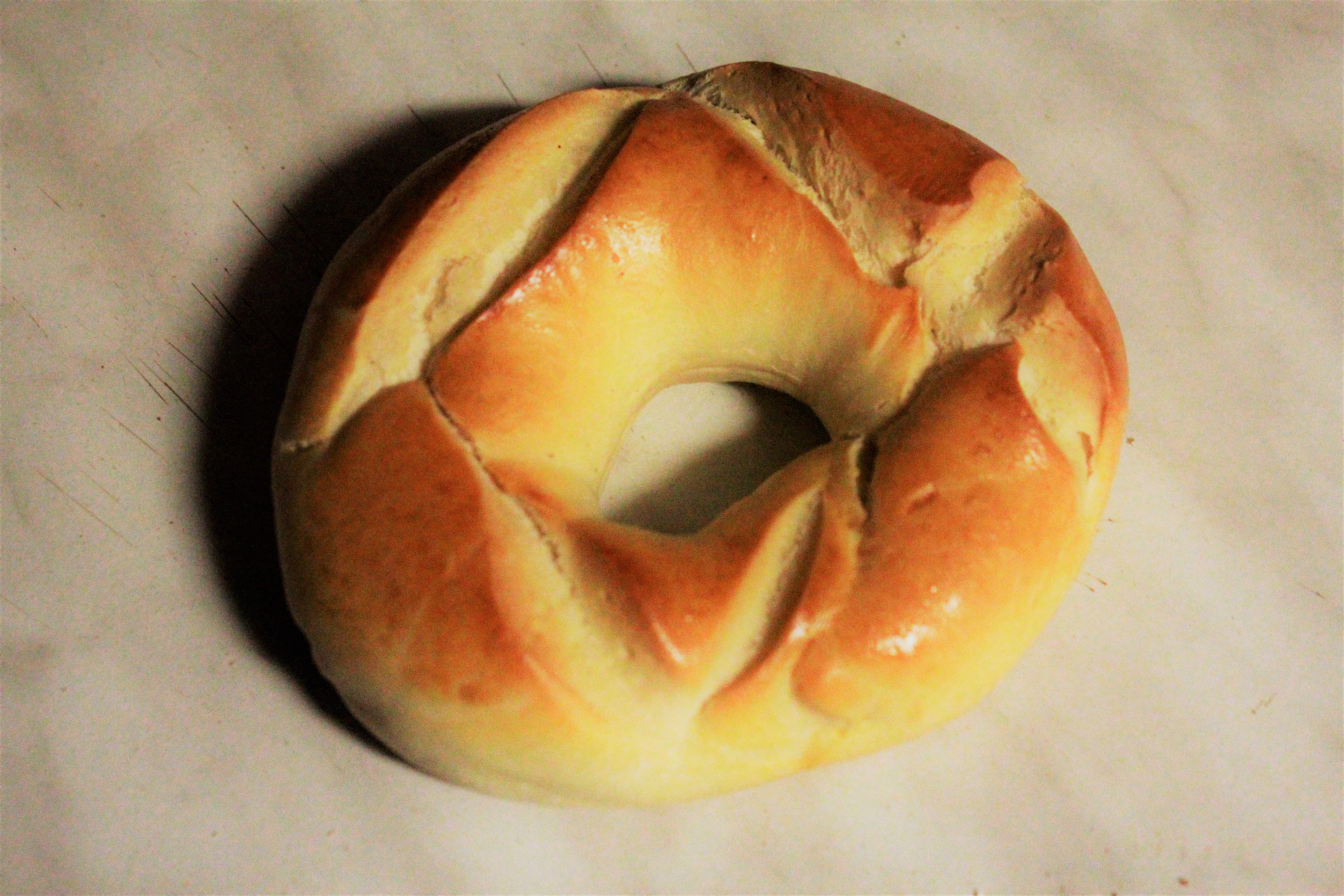 Ein Agatharingli (Agatheringlein, Agatharinglein, Agathenbrot, Agathabrot) traditionelles Brot zum 5. Februar in den katholischen Teilen der Schweiz. Das Gebäck wird im Gottesdienst gesegnet.